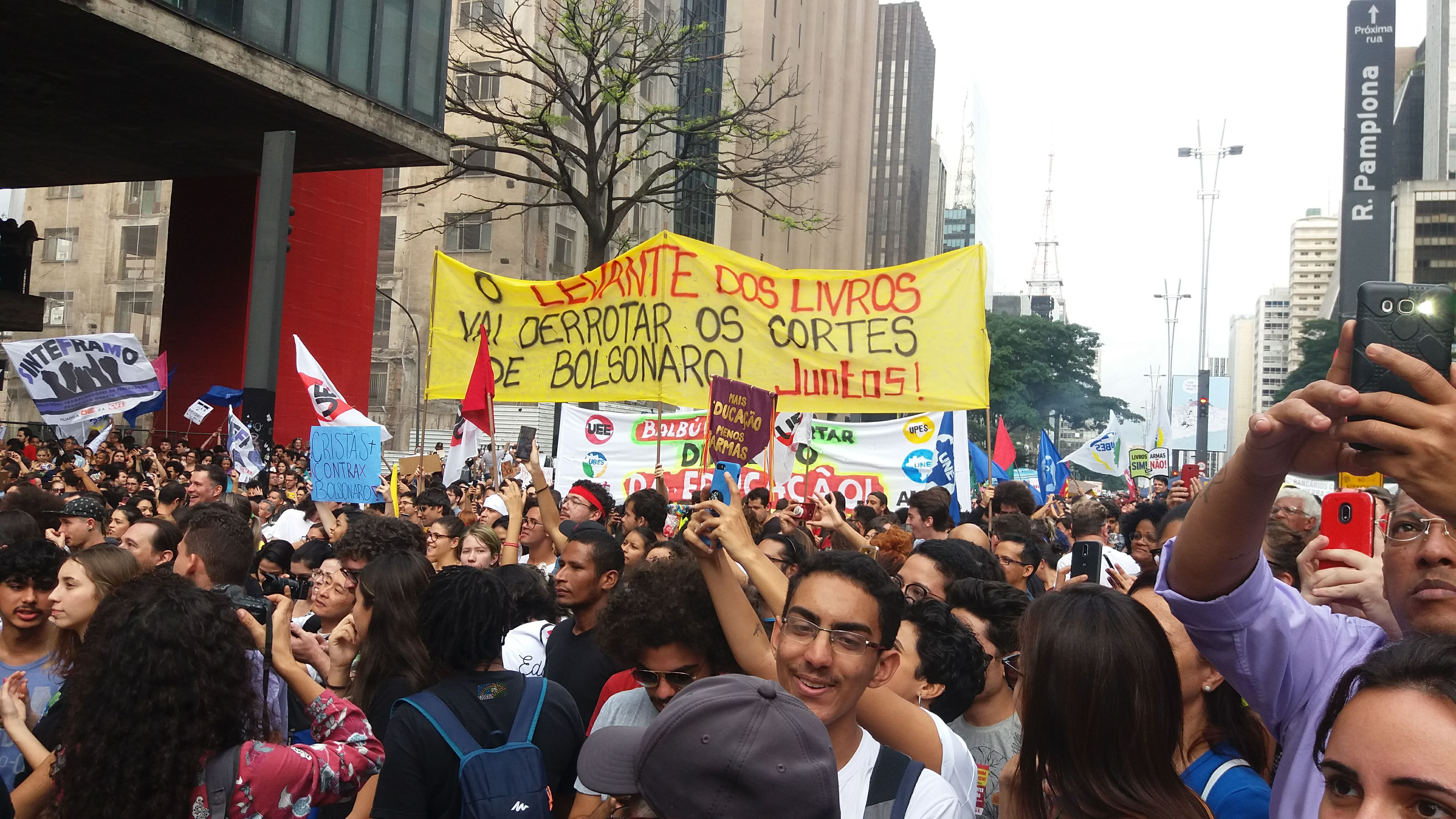 Protesto na Avenida Paulista contra o governo Jair Bolsonaro